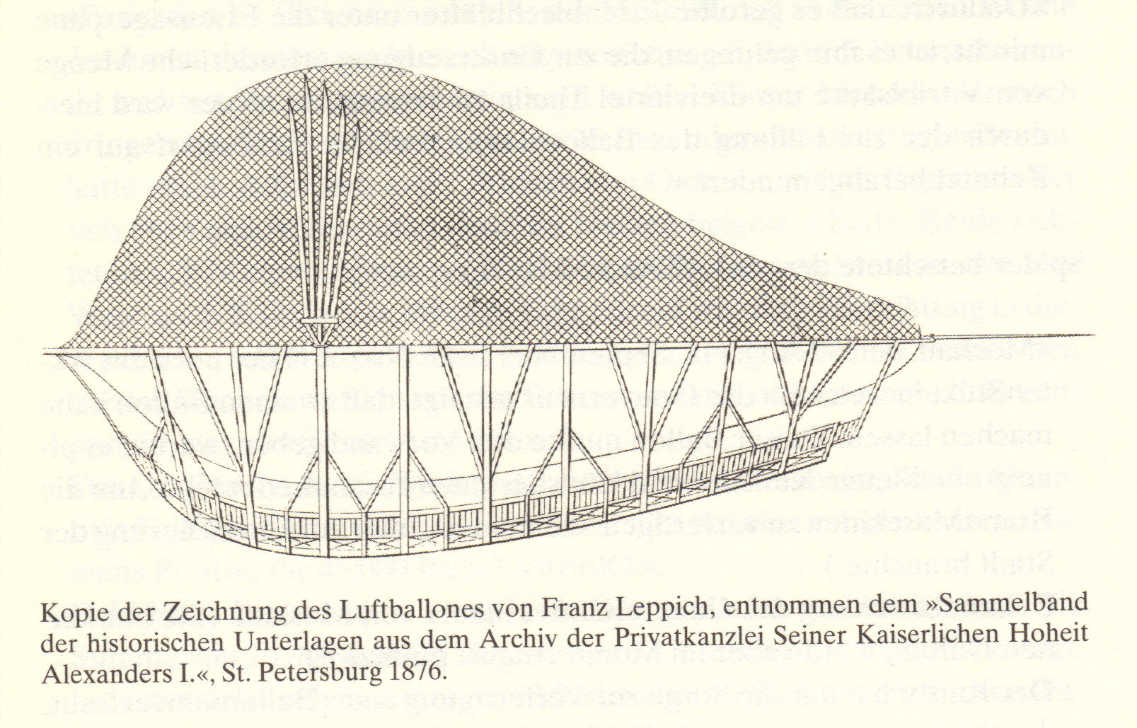 Kopie der Zeichnung von Franz Leppich für seinen Luftballon, den er für den Zaren Alexander I. bauen wollte